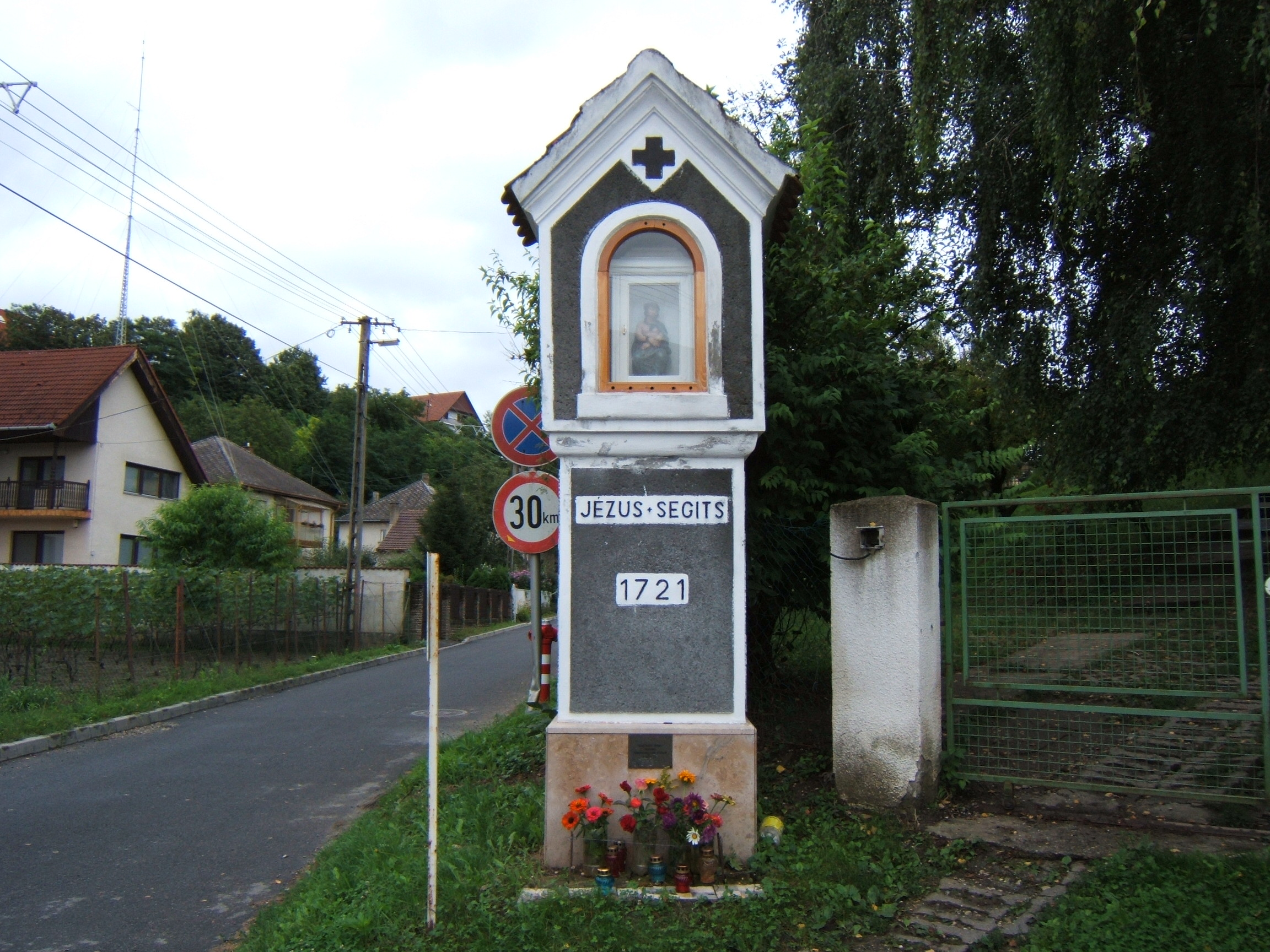 A Gugyuló Jézus-szobor képoszlopa a kaposvári Csalogány utcában, a szobor egy 2003-as másolat /wikipedia/